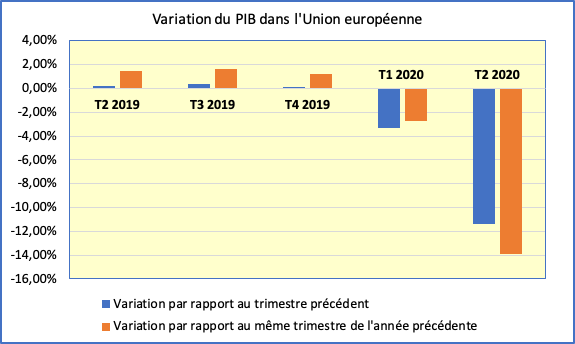 Le graphique illustre la chute du PIB dans l'UE durant la pandémie de Covid-19